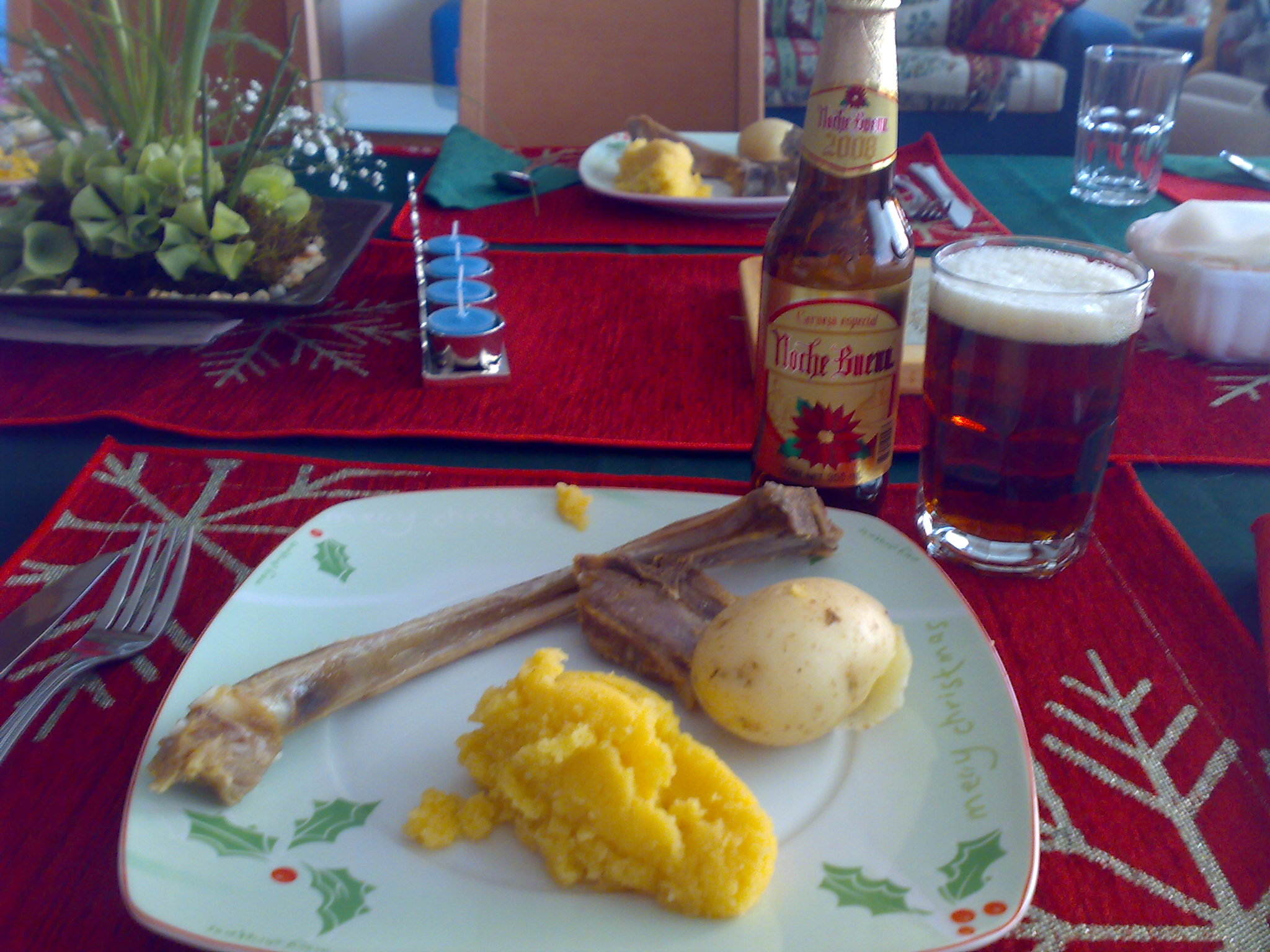 Julemiddag bestående av pinnekjøtt og juleølet "Noche Buena".